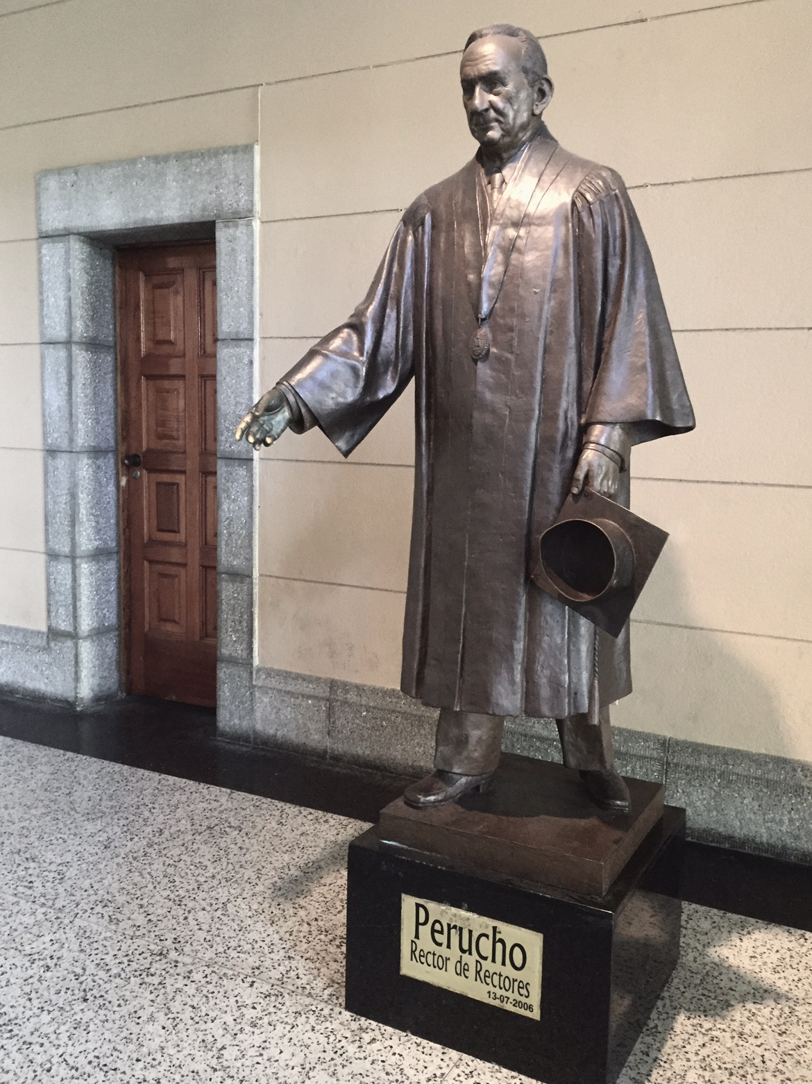 El rector Pedro Rincón Gutiérrez por el escultor Manuel de la Fuente. Rectorado de la Universidad de Los Andes, Mérida, Venezuela.